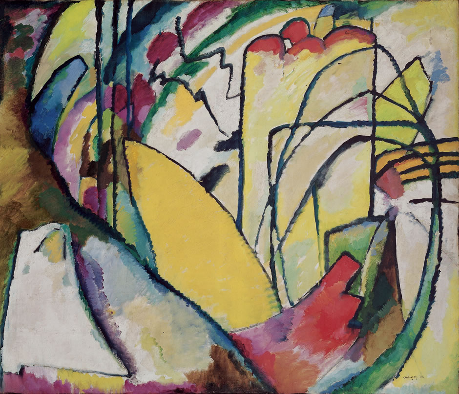 Wassily Kandinsky: Improvisation 10, (1910), Öl auf Leinwand, 120 x 140 cm, Fondation Beyeler